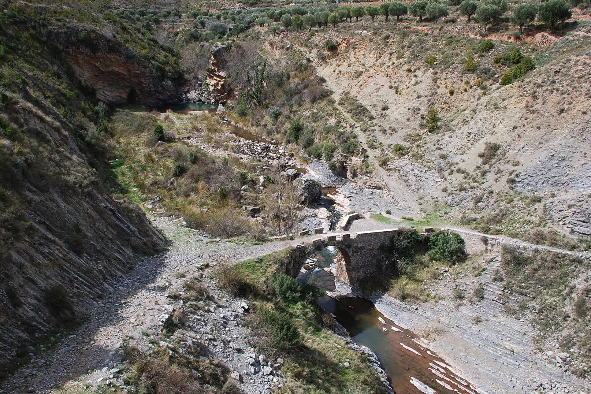 El río Jubera a su paso por Jubera.